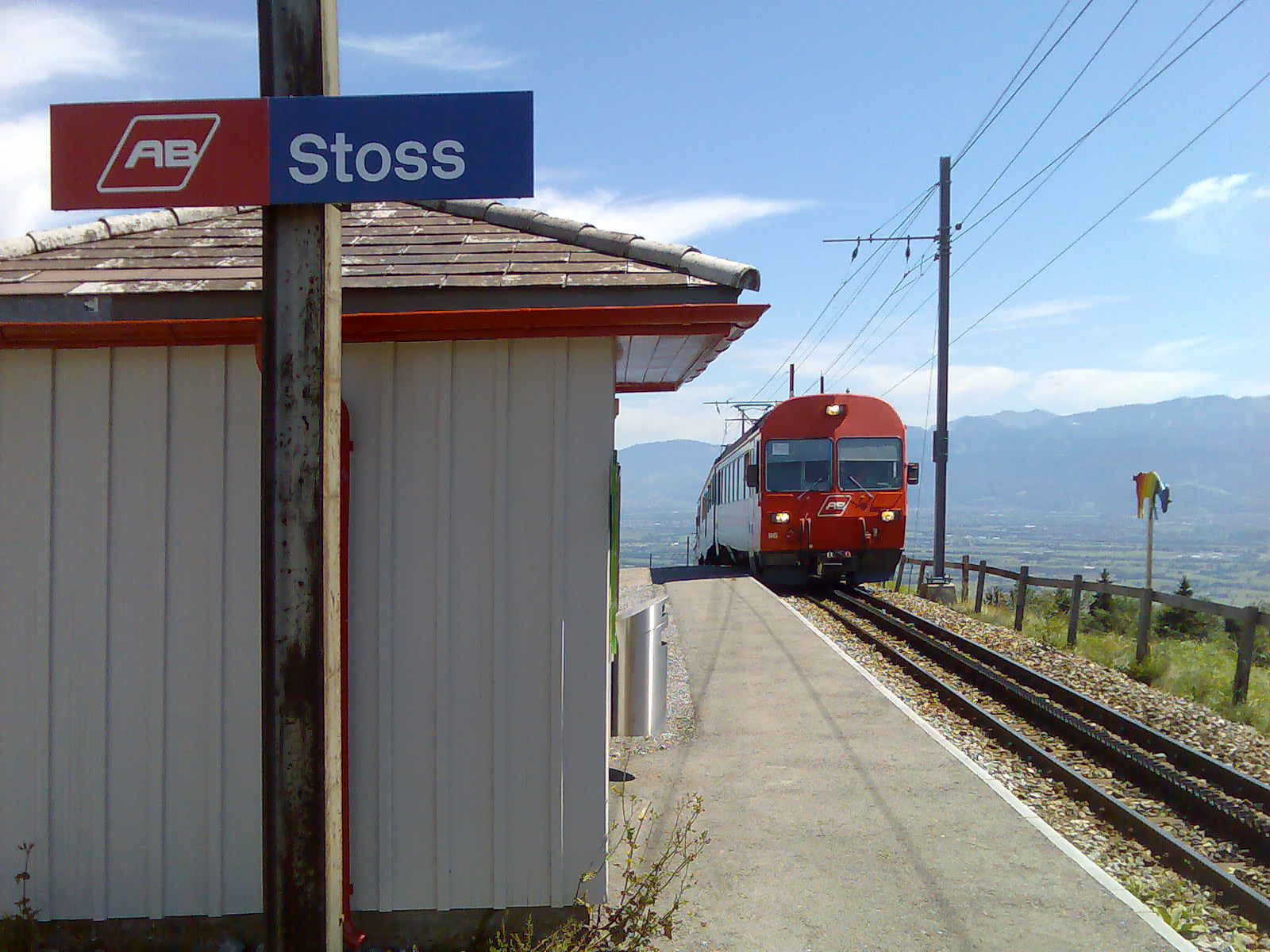 Kleines Holz-Gebäude zu den Gleisen (rechts) offen, im Vordergrund Schild mit Aufschrift 'AB Stoss', im Hintergrund einfahrende Zugskomposition der Appenzellerbahnen